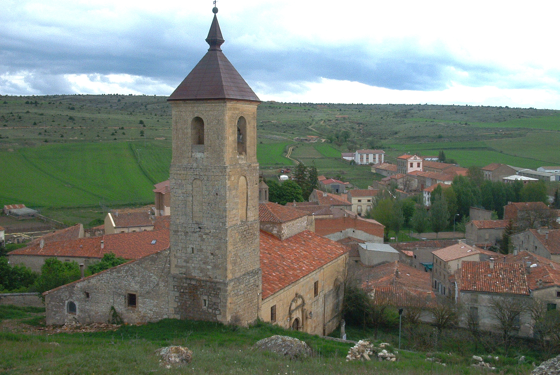 Iglesia de Maranchón vista desde el Altollano